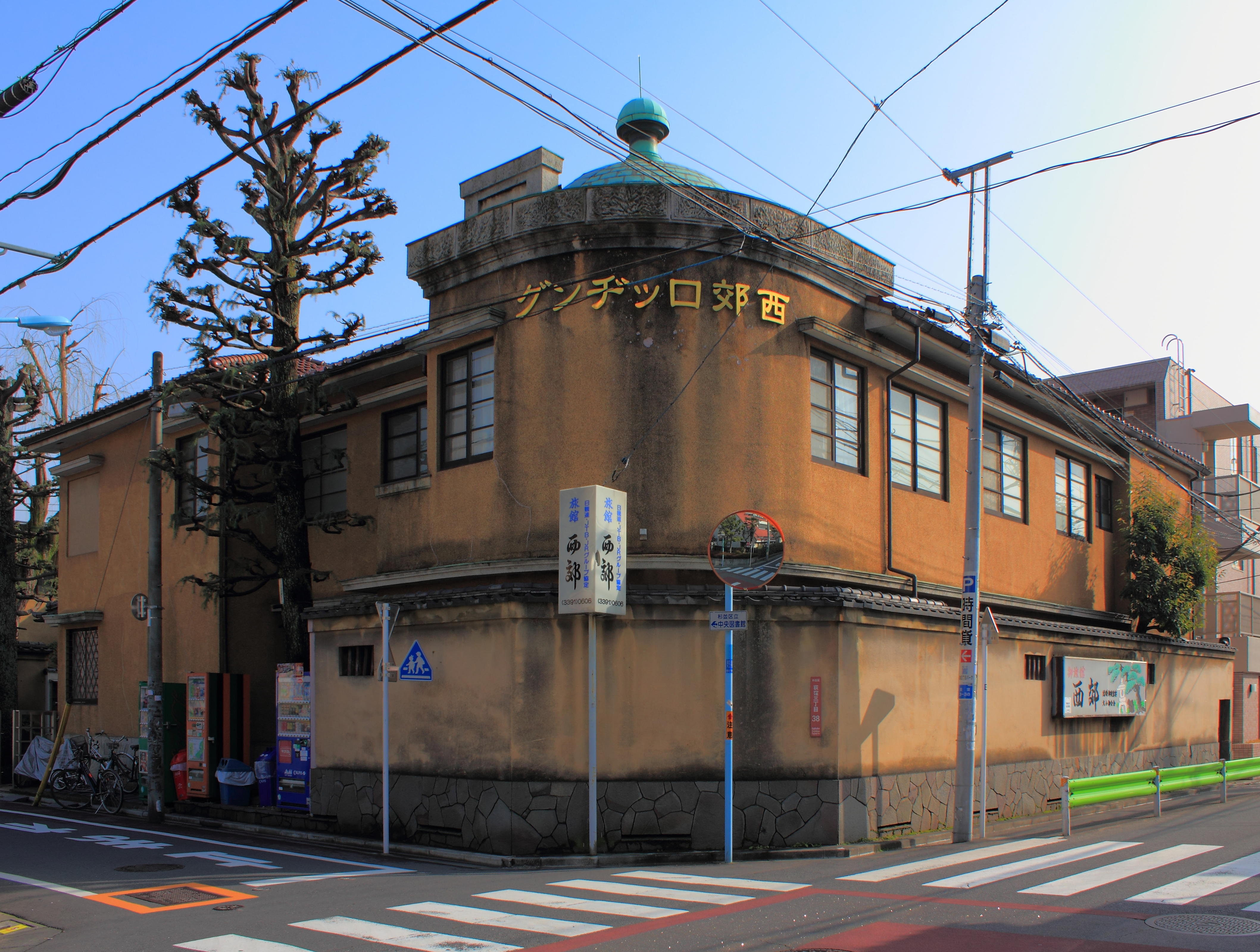 西郊ロッヂング（国登録有形文化財・東京都杉並区）。